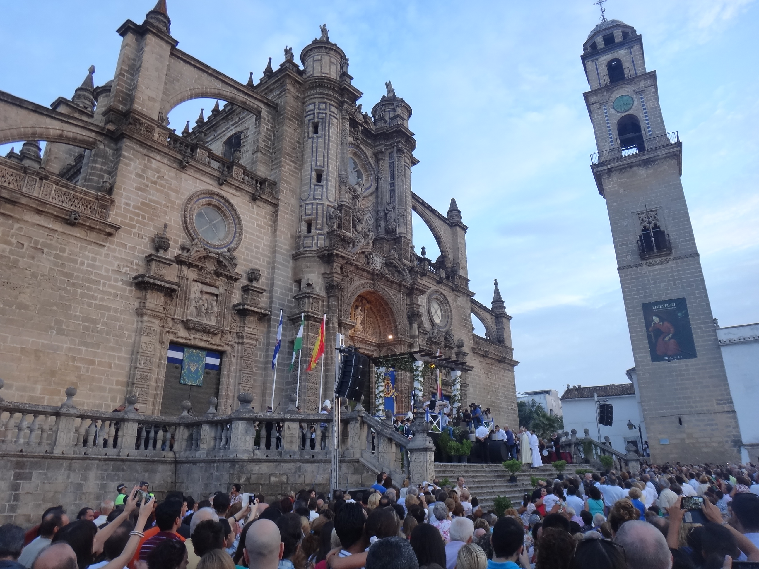 Catedral de Jerez de la Frontera en la Feria de la Vendimia 2015